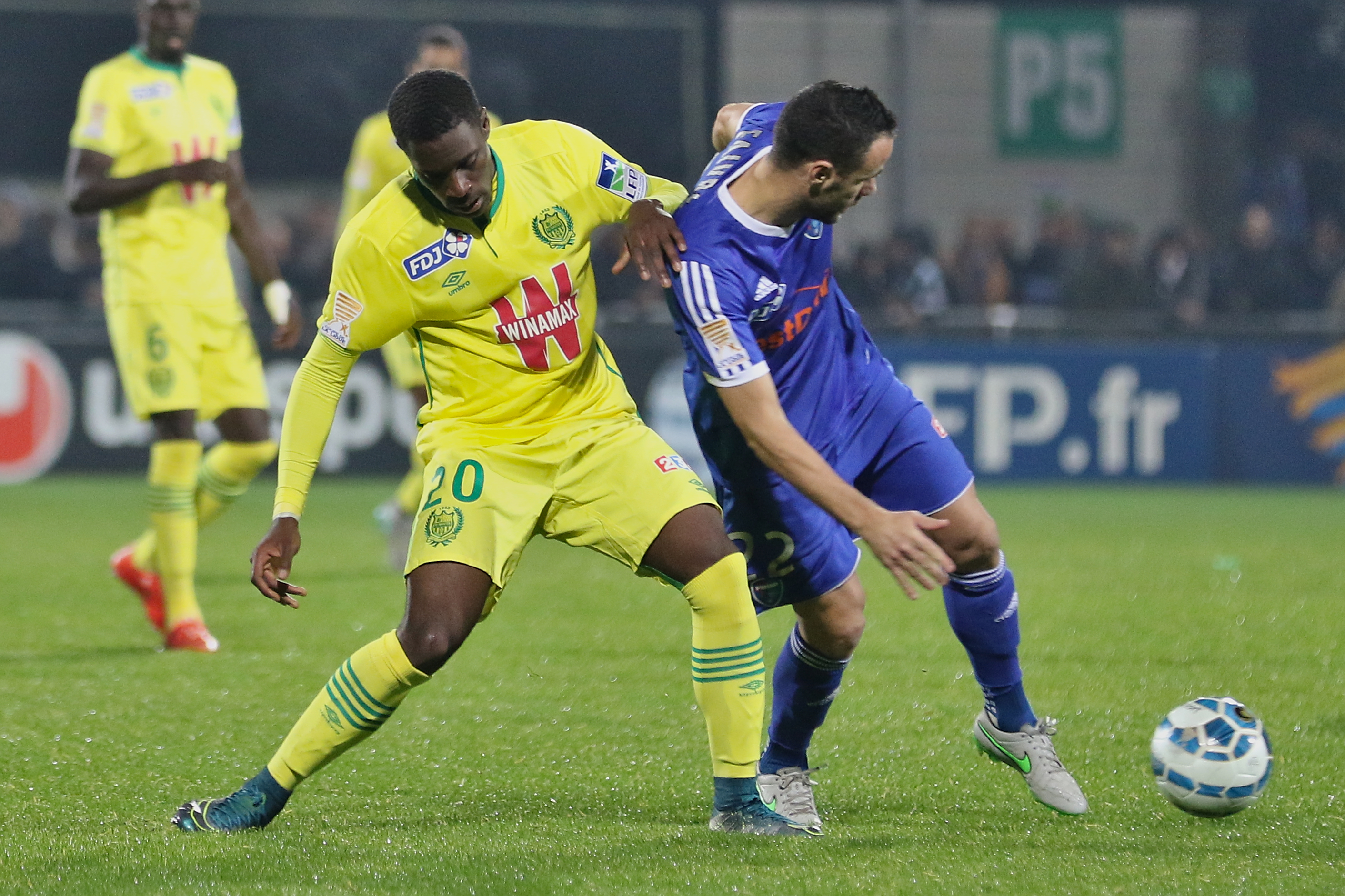 FBBP01 - FCN - 20151028 - Coupe de la Ligue - Jules Iloki et Aurélien Faivre